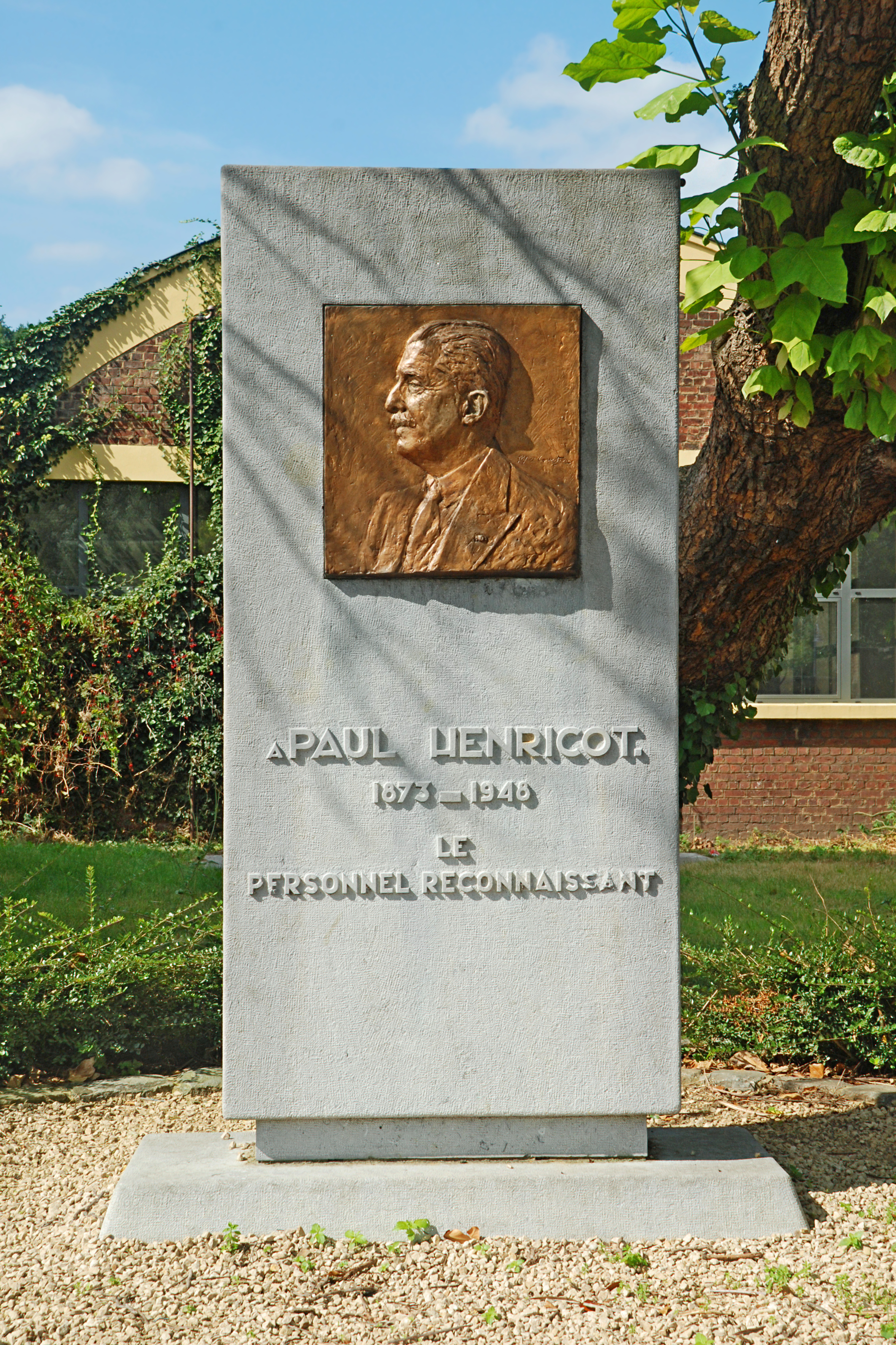 Belgique - Brabant wallon - Court-Saint-Étienne - Grands bureaux de l'usine Henricot n°2 - Stèle Paul Henricot (Courtens)